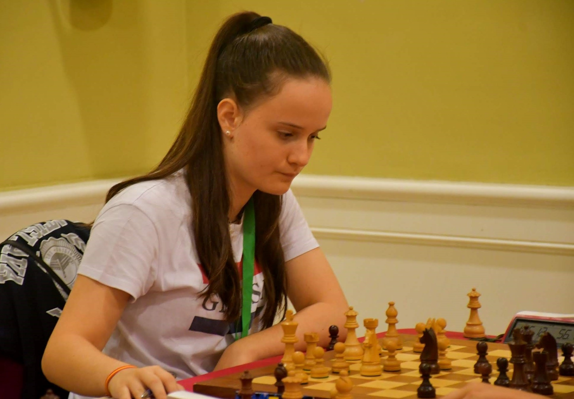 Partida campeonato de España por equipos 2ª división 2019